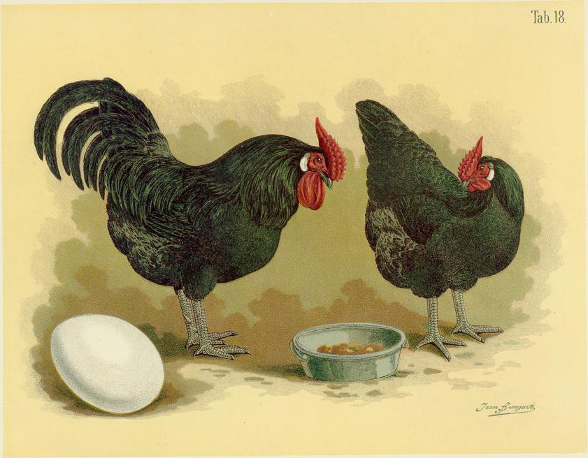 Huhn von Mans. Poule de Mans.